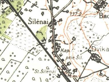 Деревня Шиленай. Фрагмент литовской топографической карты 1923-1938 гг. Масштаб: 1:100000)